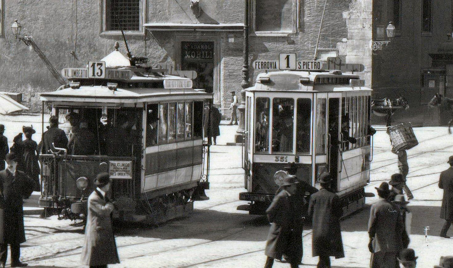 piazza Venezia tram SRTO